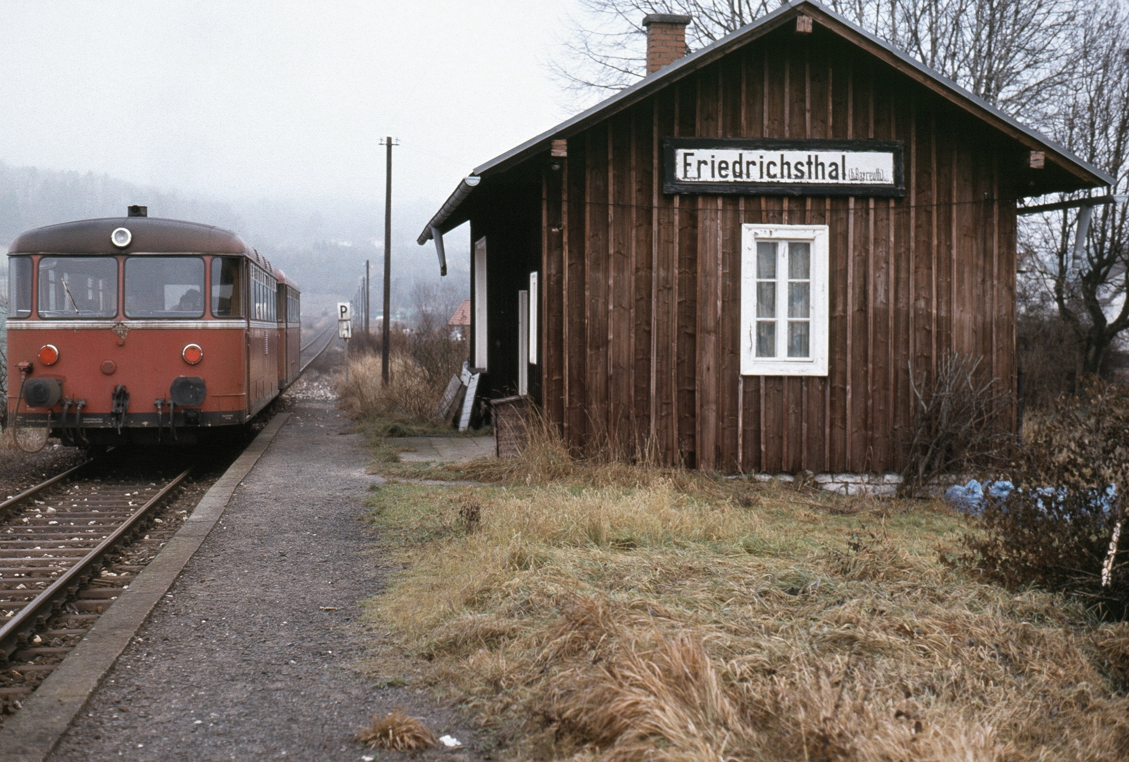 Haltepunkt Bayreuth Friedrichsthal 1987 (Scan von Dia)